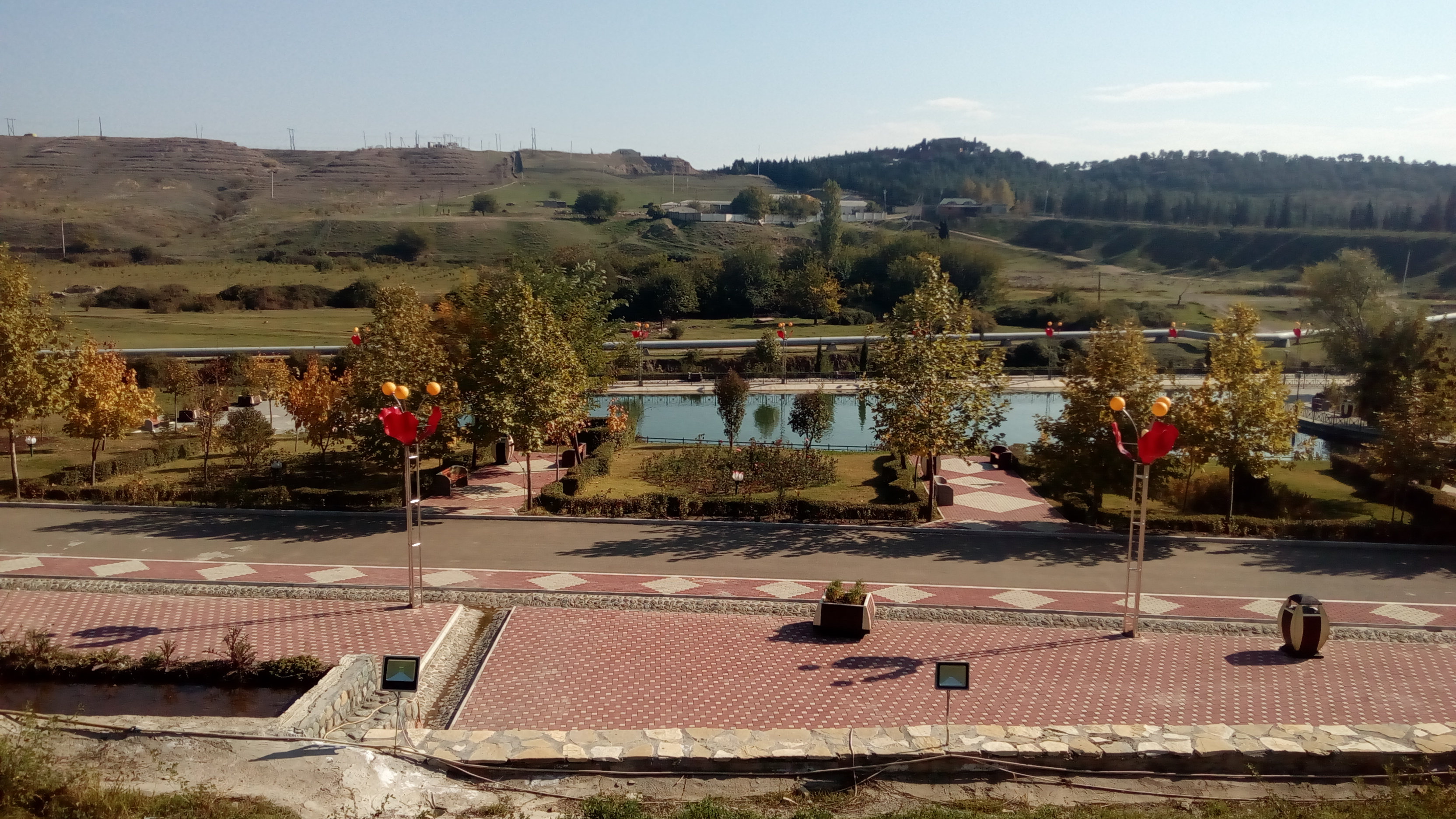 Tovuz